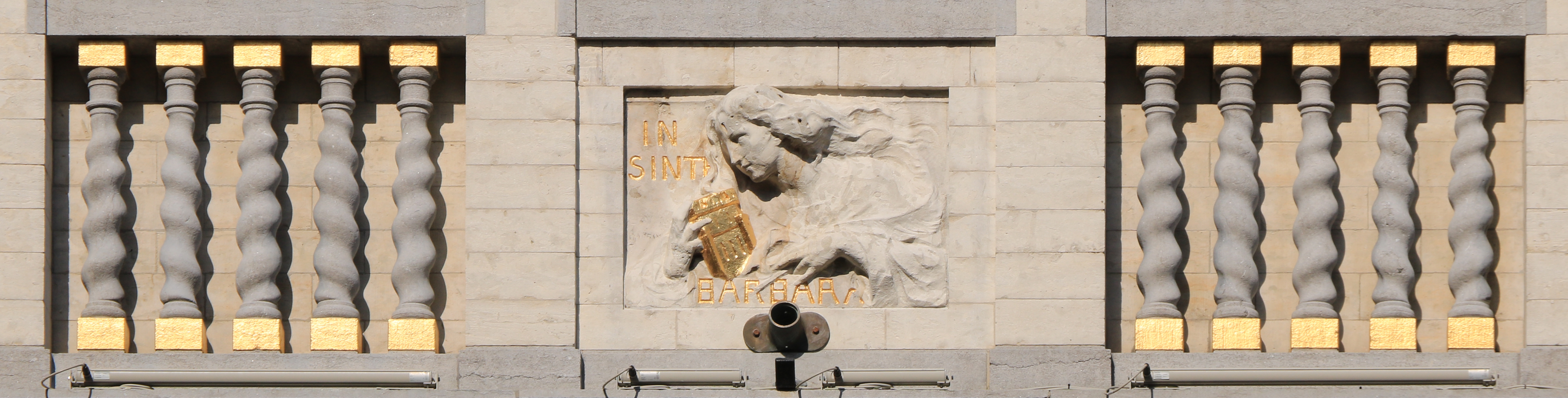 Belgique - Bruxelles - Grand-Place n° 38 - Maison de Sainte-Barbe This photo of immovable heritage has been taken in the Brussels Capital Region